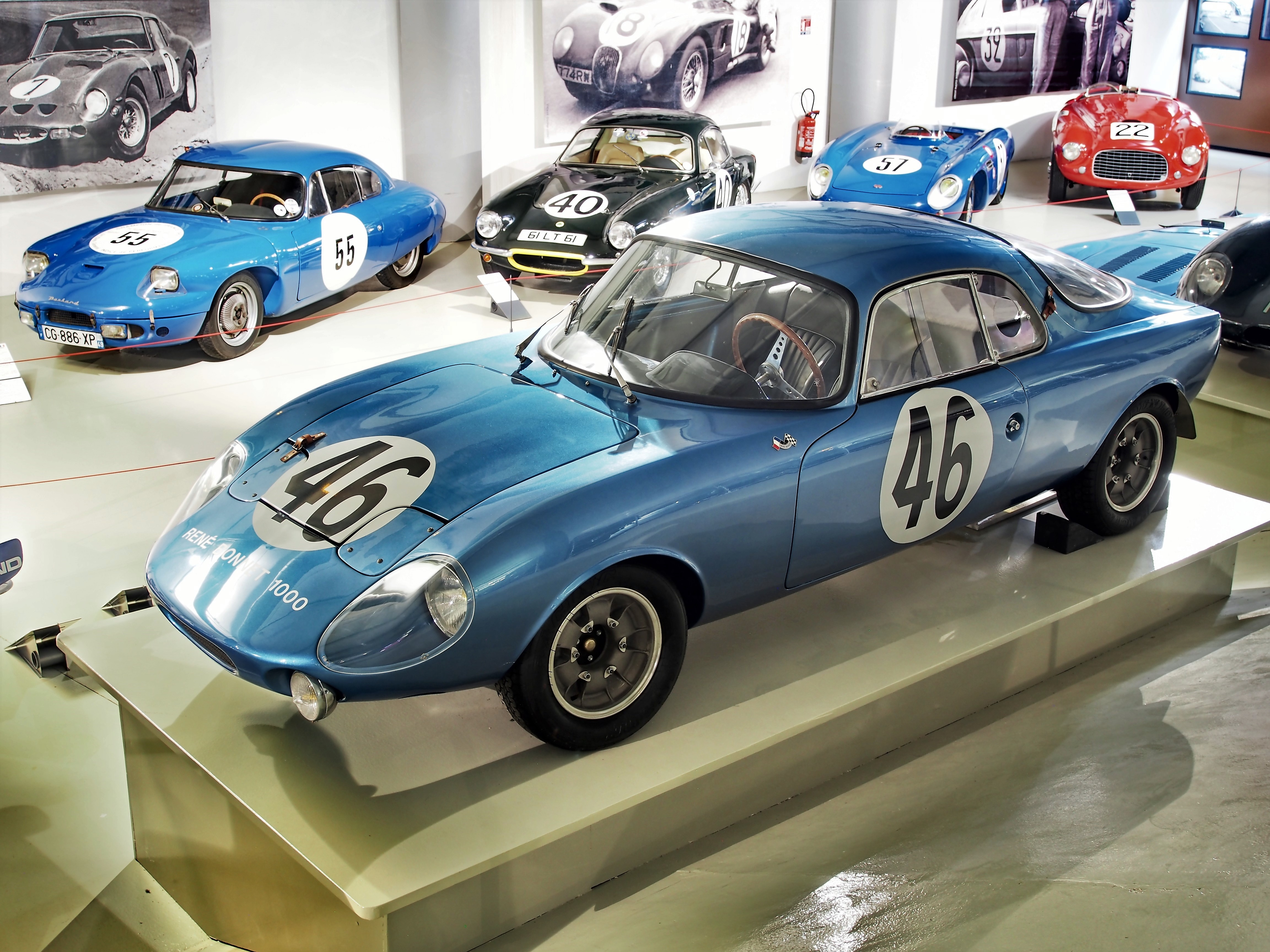 Photographed at Musée des 24 Heures du Mans, France.